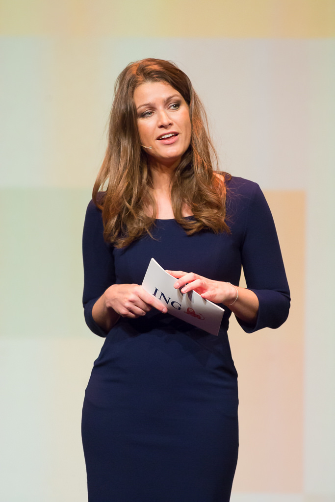 Merel Westrik.